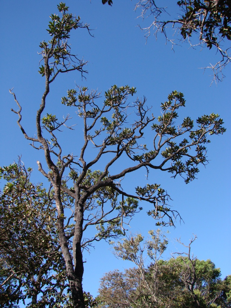 Vochysia thyrsoidea - VOCHYSIACEAE Jardim Botânico de Brasília - Brasília - Distrito Federal - Brasil.